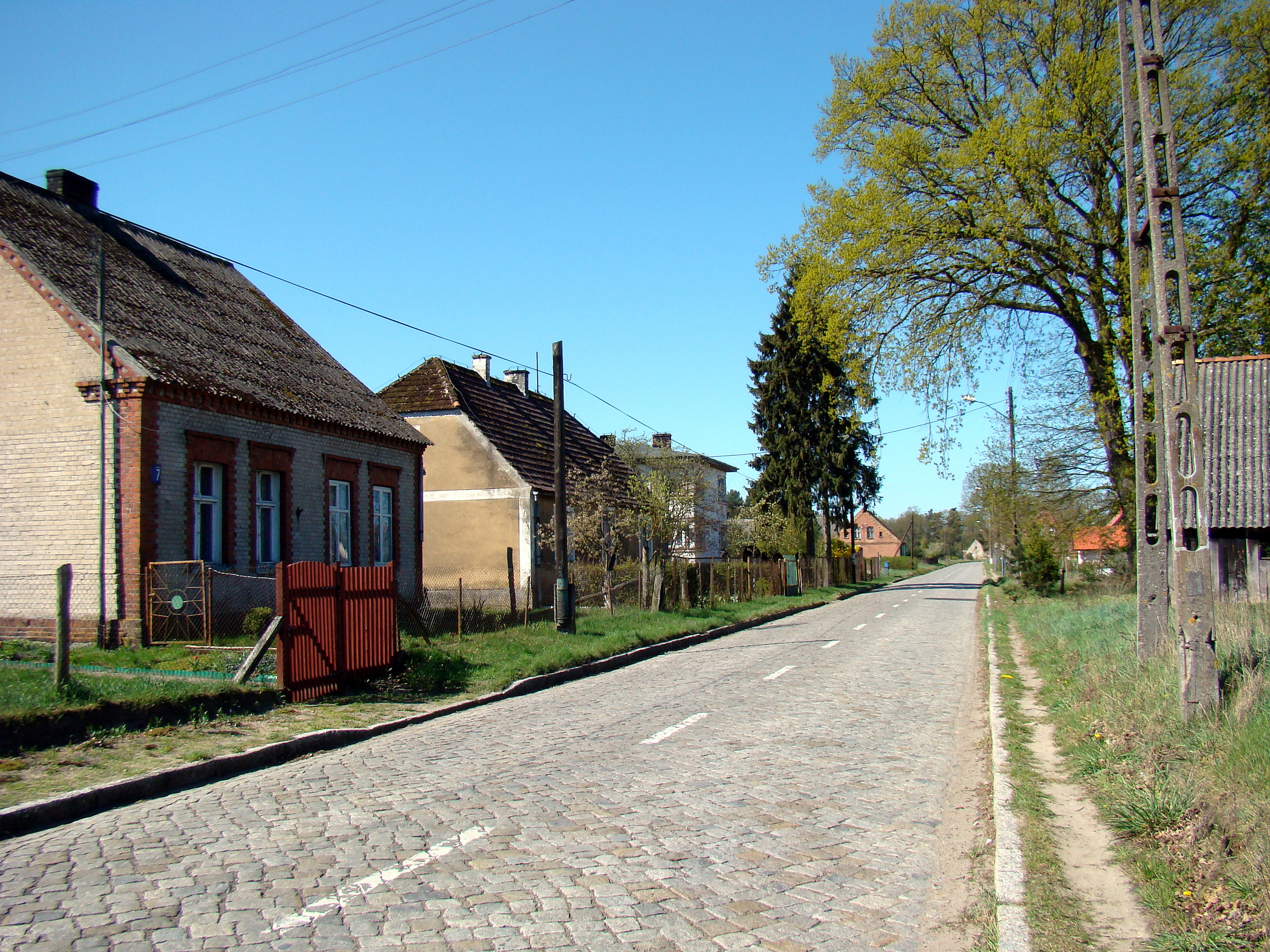 Brzózki (Gmina Nowe Warpno, Województwo zachodniopomorskie), Polska